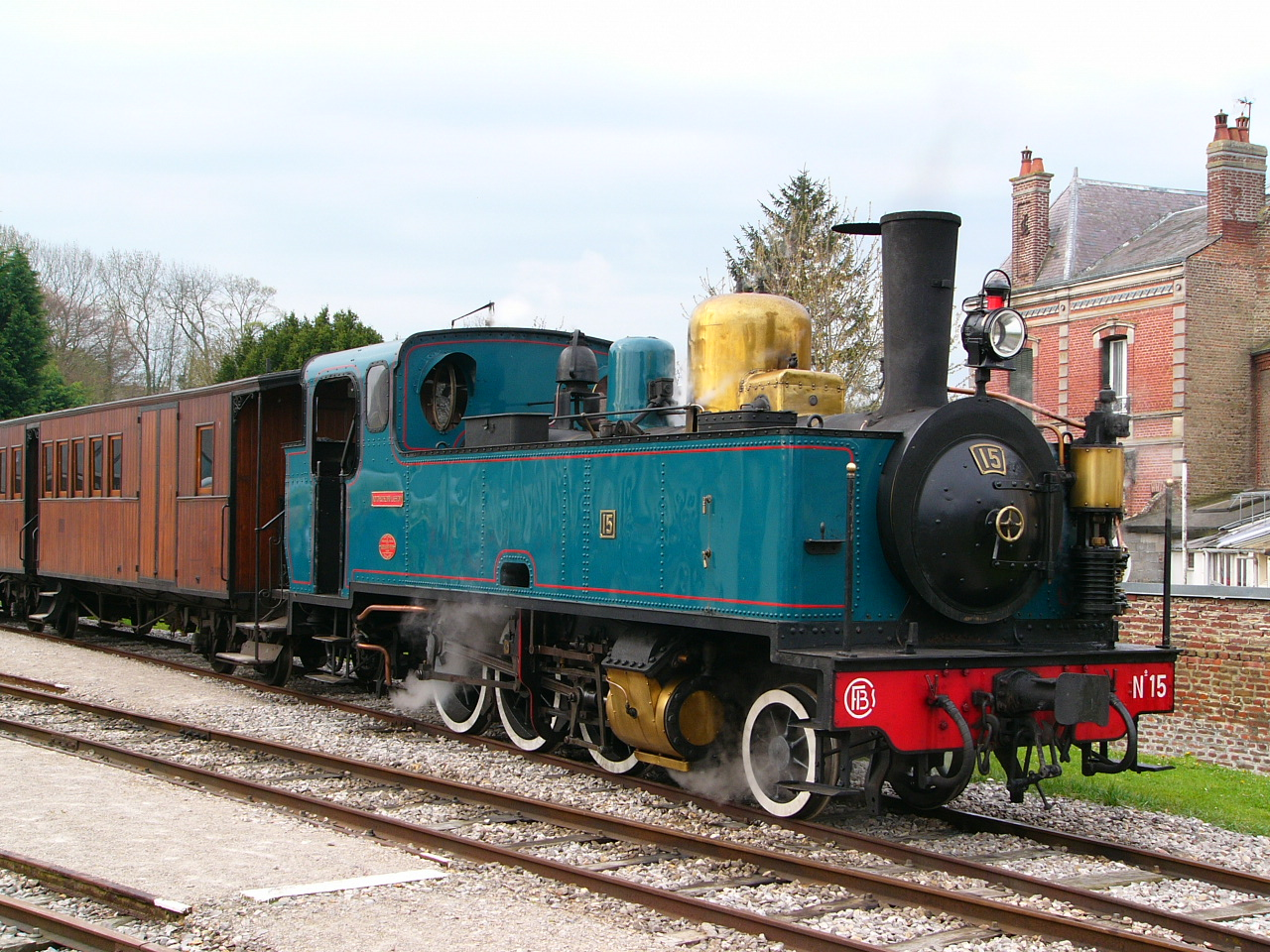 Locomotive à voie métrique 130 T N°15 fabriquée en 1920 par Haine Saint Pierre pour le réseau secondaire du Noyonnais, puis utilisée sur le Estrées-Saint-Denis - Froissy - Crèvecœur-le-Grand (Oise) et maintenant sauvegardée au Chemin de fer de la baie de Somme Photo prise gare de Saint-Valery-Ville lors de la Fête de la vapeur 2006